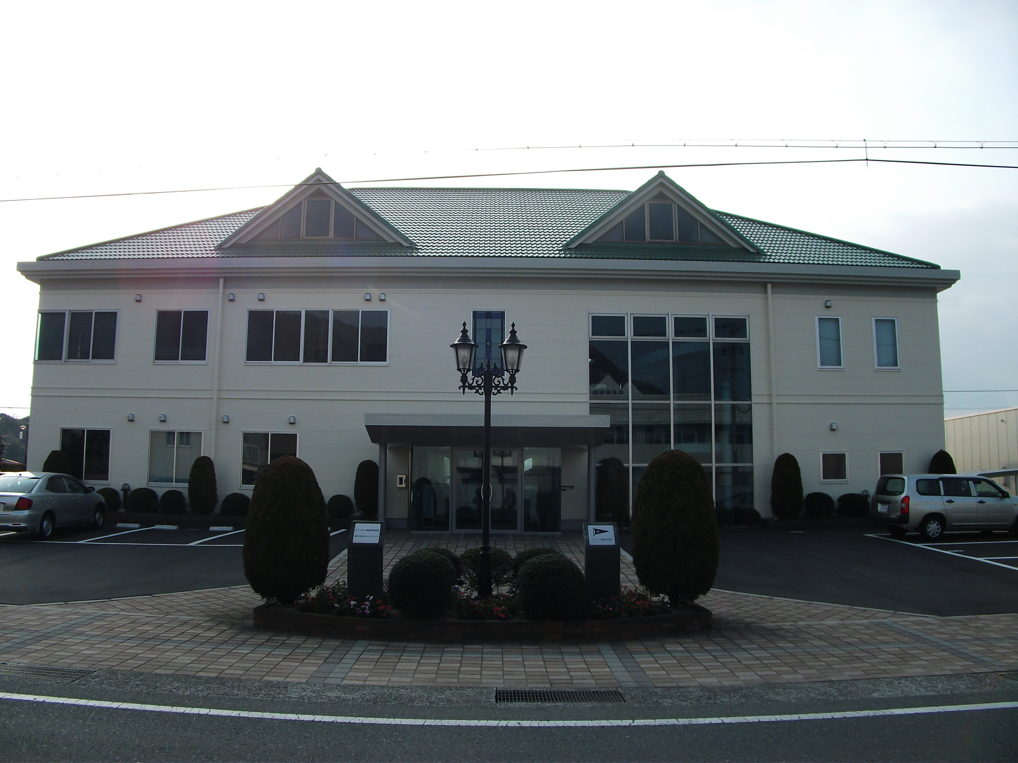 広島県竹原市、アヲハタ本社